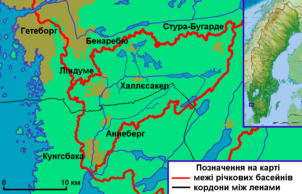 Карта річки Кунгсбакаон на півдні Швеції у ленах Галланд і Вестра-Йоталанд. Створено на основі карти річок лену Вестра-Йоталанд Västra Götalands län на сайті SMHI Шведського інституту метеорології та гідрології і карти басейну річки Кунгсбакаон Avrinningsområde nr 107-Kungsbackaån. Використано також карти Avrinningsområde nr 108-Göta älv і File:Göteborgs tätort 1990.jpeg для позначення кордону міста Гетеборг. Використано карту File:Sweden relief location map.jpg.